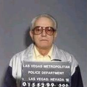 Anthony Civella - Mugshot